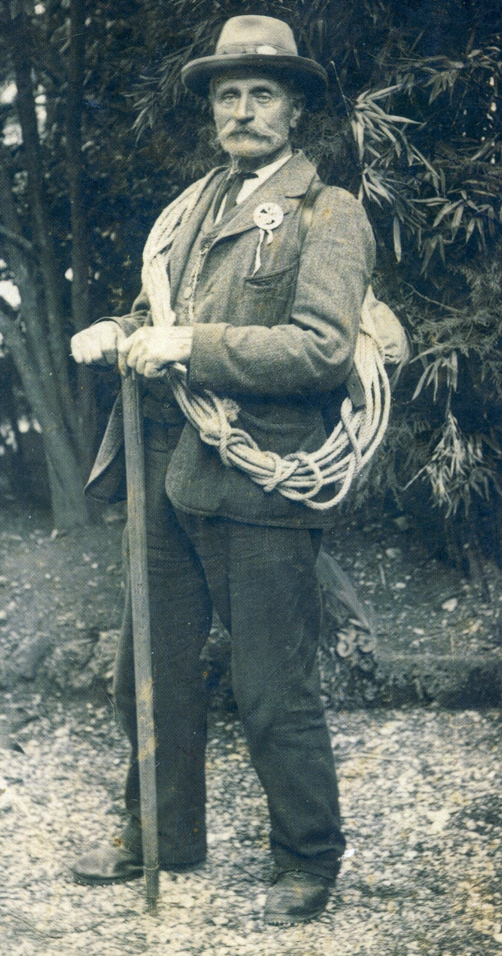 Antonio Baroni, alpinista italiano (1833 – 1912)